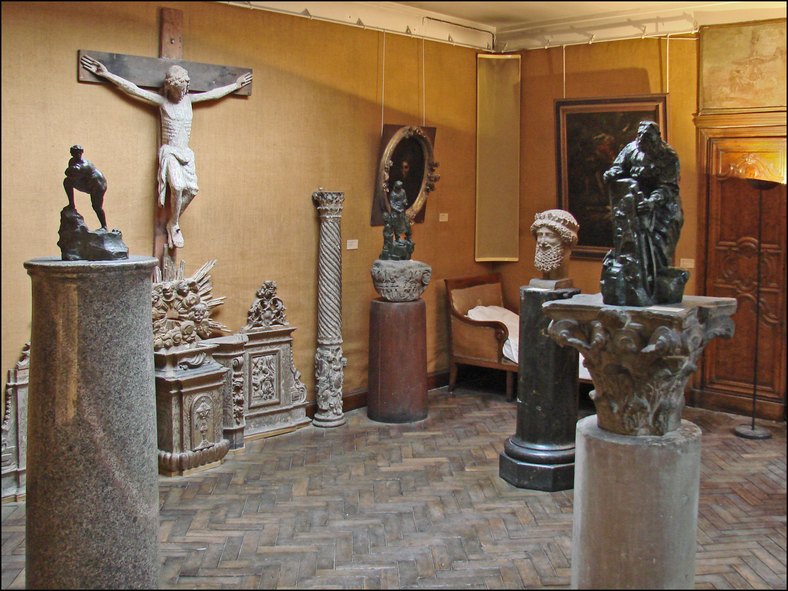 "Témoins d’un lieu habité, le lit de Bourdelle ainsi que le mobilier, disposés par le sculpteur lui-même, contribuent à insuffler à cet appartement un parfum d’intimité. La décoration raffinée de certains éléments – le vantail de la porte latérale, le linteau de l’autre, le miroir composite – répond à la rusticité du poêle ou de la cheminée. La collection de Bourdelle fait écho à celle de l’atelier : un Christ en croix, un chapiteau médiéval, des toiles d’après les maîtres – Titien, Prud’hon ou « à la manière de» Rembrandt – mais aussi et surtout l’unique moulage de l’un des deux David de la cathédrale de Reims, dont le pendant est également conservé au musée, et que Bourdelle, sauva peu avant 1910 alors que la Première guerre mondiale allait gravement endommager l’édifice champenois. Enfin, des œuvres diverses, peintes ou sculptées, évoquent l’environnement familial du sculpteur, Pierre, le fils de Bourdelle, Cléopâtre, muse et seconde épouse du sculpteur, et leur fille Rhodia"(extrait du site officiel) Musée Bourdelle